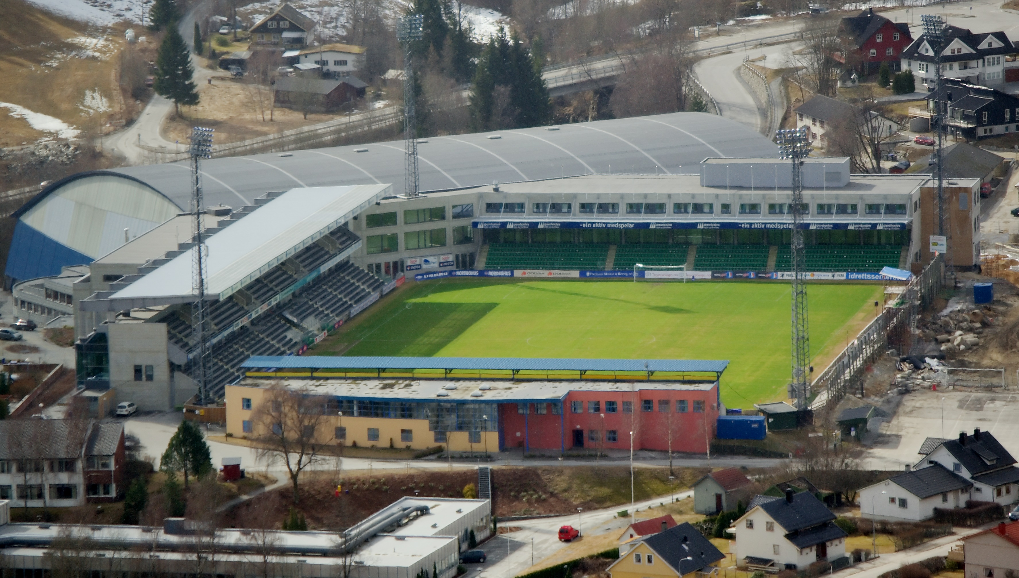 Fosshaugane Campus sett frå Åberge.